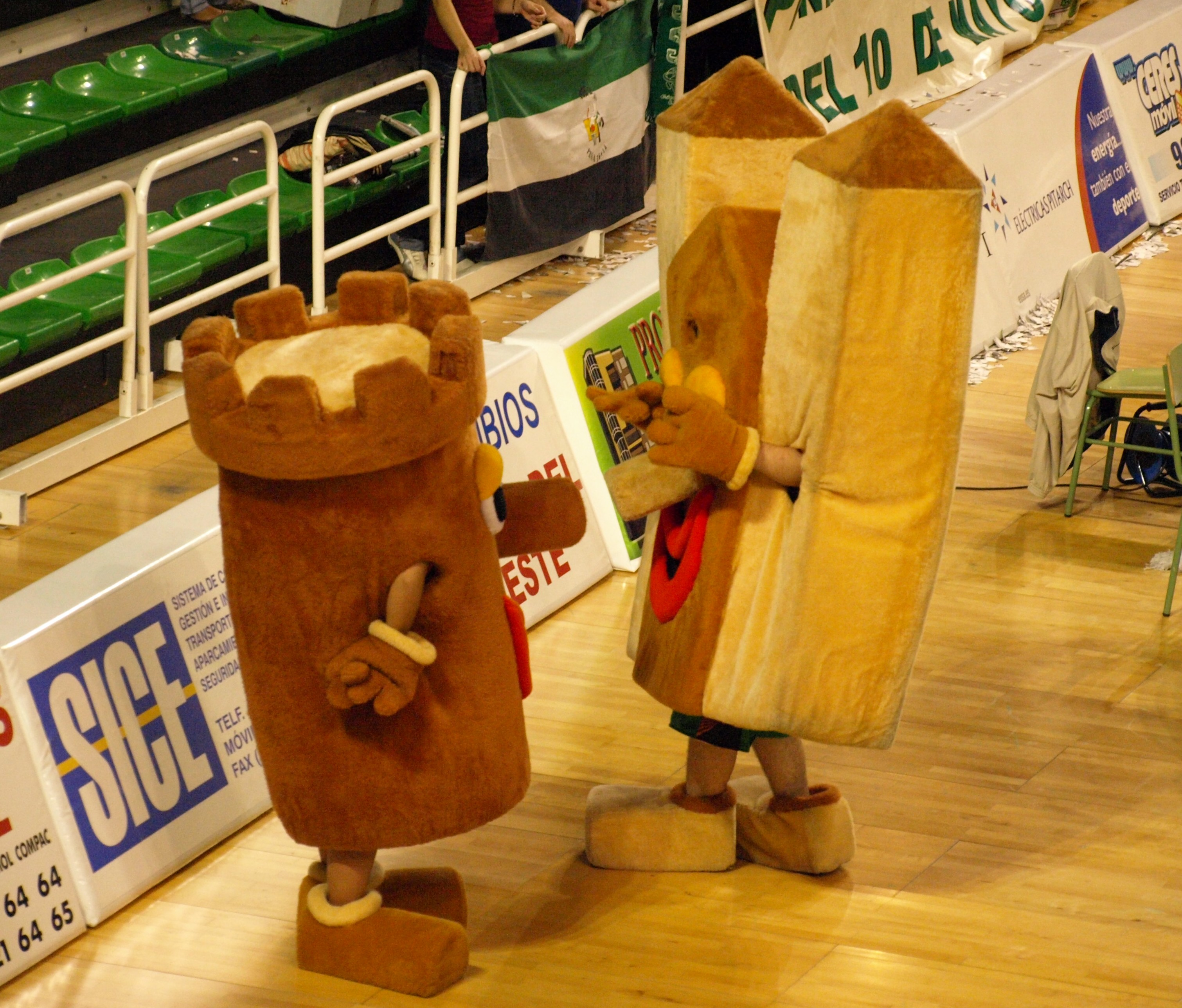 Mascotas del Cáceres 2016 en el Pabellón Multiusos Ciudad de Cáceres.